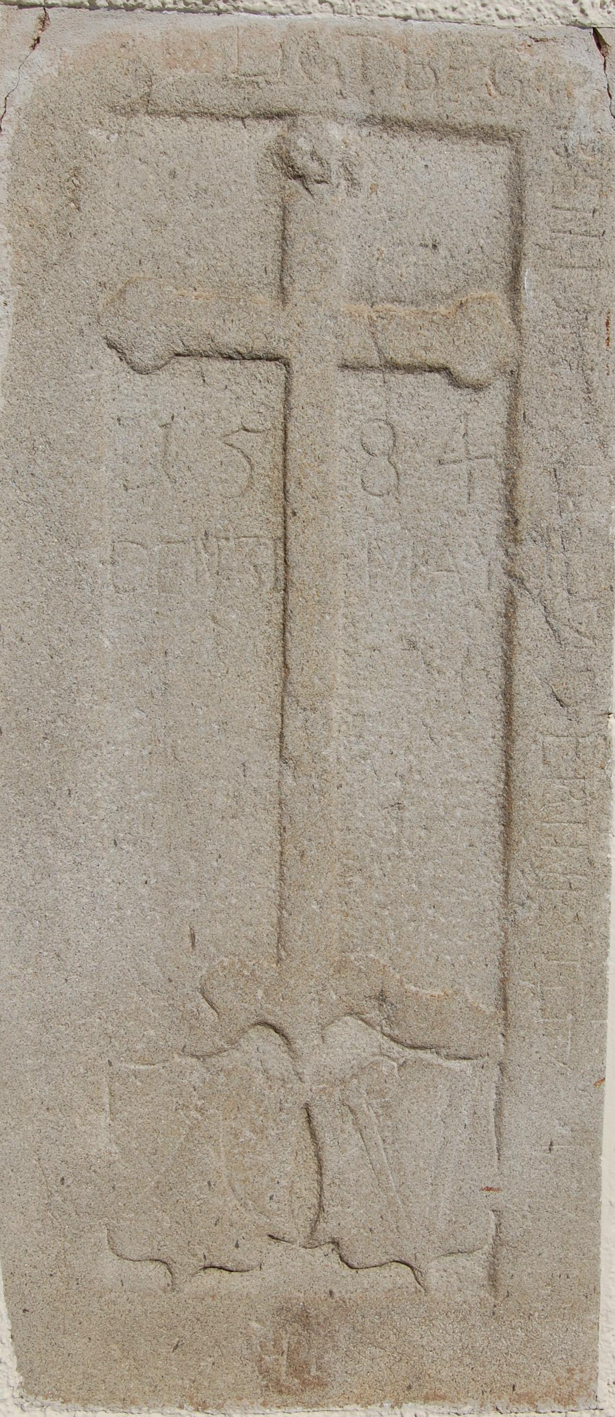 Grabplatte der Plassenberger aus dem Jahre 1584 an der Außenmauer der Expositurkirche Maria Magdalena in Gleiritsch